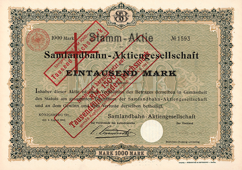 Aktie über 1000 Mark der Samlandbahn AG vom 4. August 1900